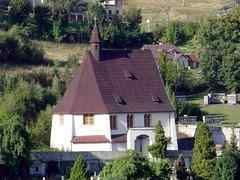 Kostel Všech svatých, st. 610, pp. 826, Jáchymov.